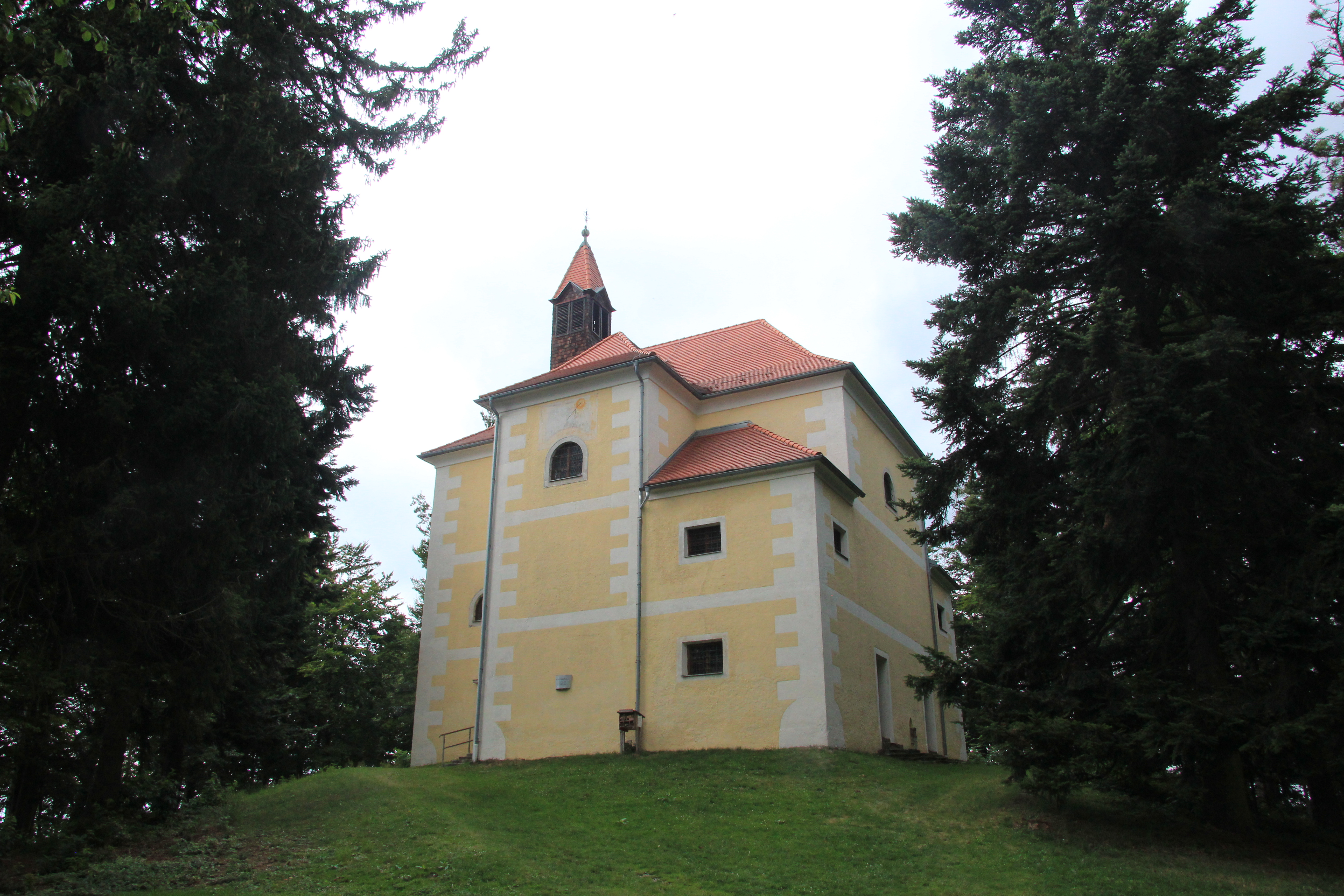 Rosalienkapelle in Neustift an der Rosalia